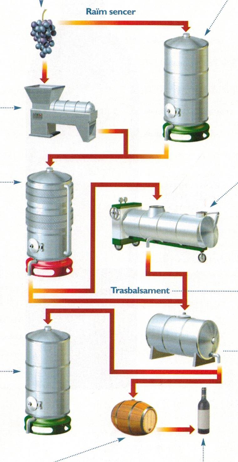 Maquinaria i elaboració del vi negre